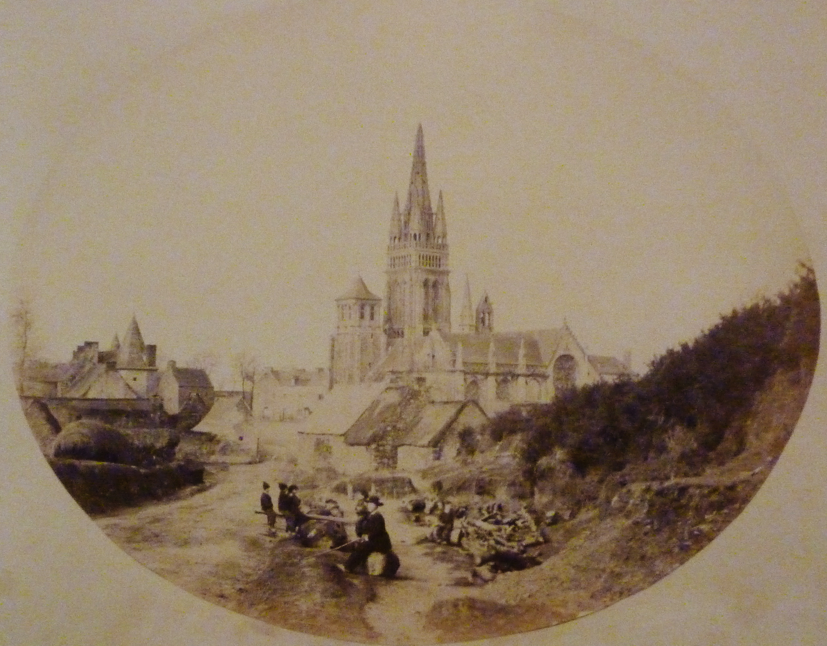 Vue générale du Folgoët vers 1870 (photo tirage sur papier albuminé de Théophile Jaouen, Musée de Bretagne, Rennes)